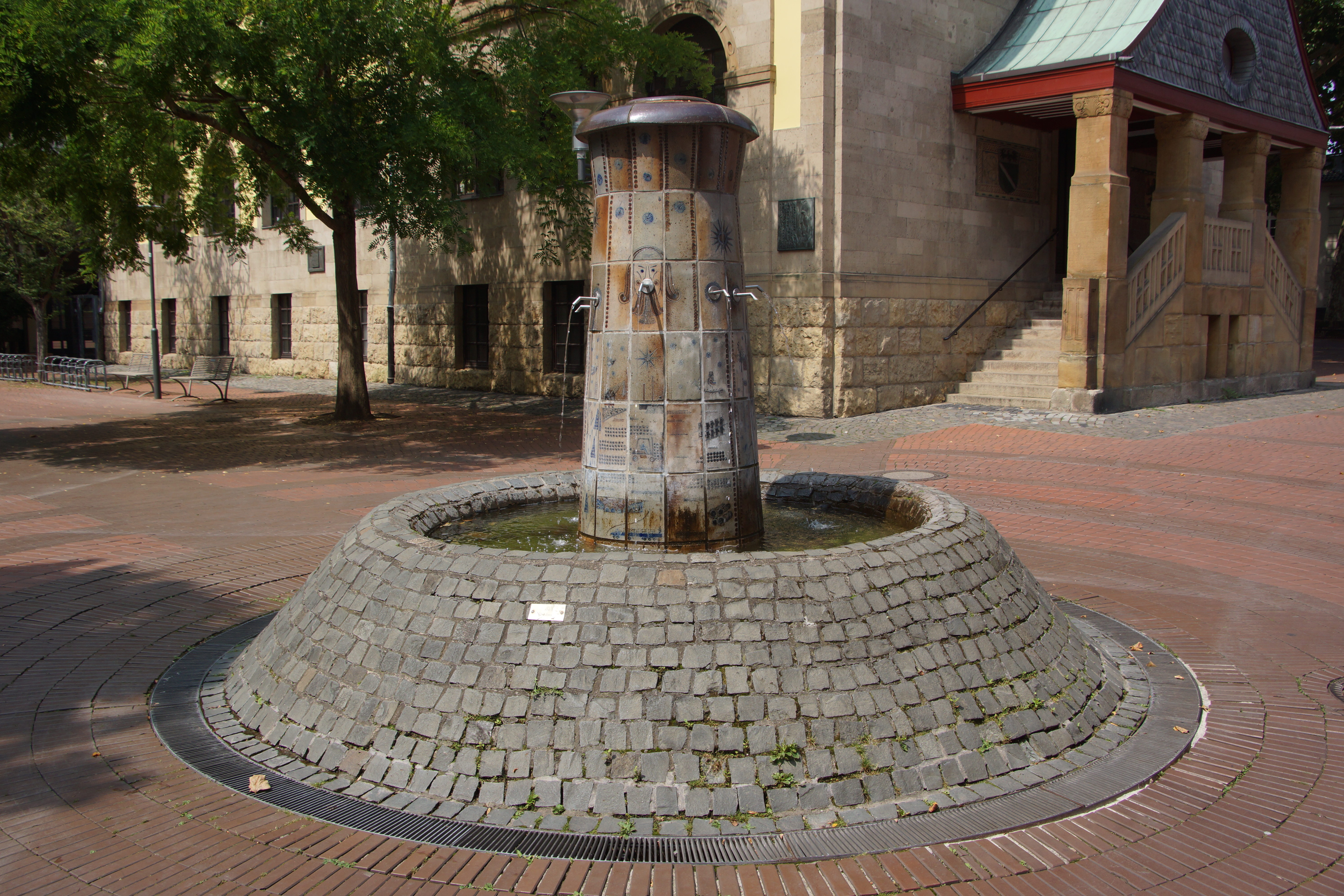 Keramikbrunnen in der Frechener Fußgängerzone, Antoniterstraße, gestaltet von Wim Mühlendyck, 1981, von dem Steinzeugunternehmen „Cremer & Breuer“ und dem Werk „Kalscheuer“ gestiftet